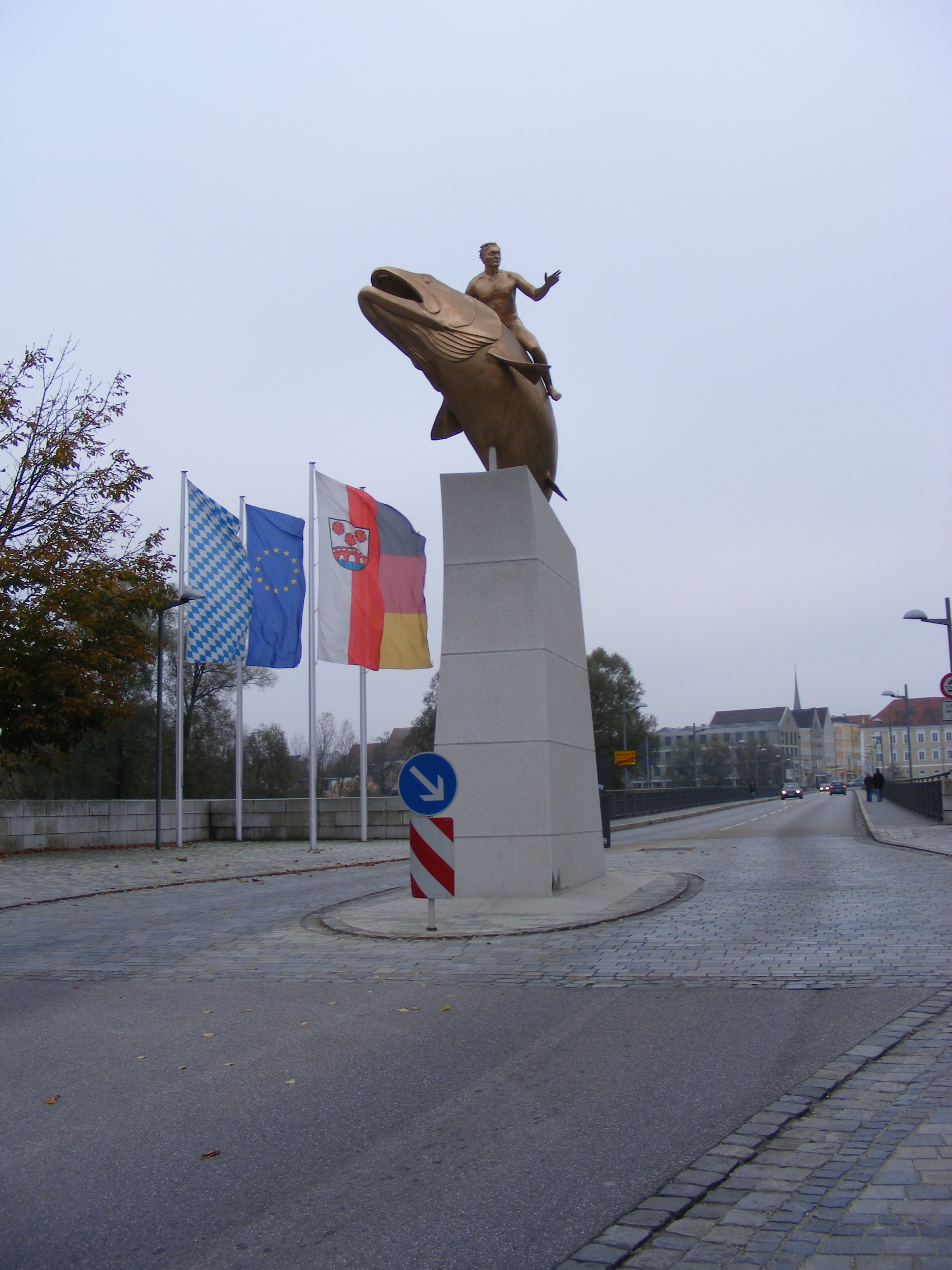 Simbach am Inn: Skulptur „Aenus reitet auf einem Huchen“, vor der Innbrücke nach Braunau am Inn, Österreich — die Flussmitte bildet die Grenze zwischen Deutschland und Österreich